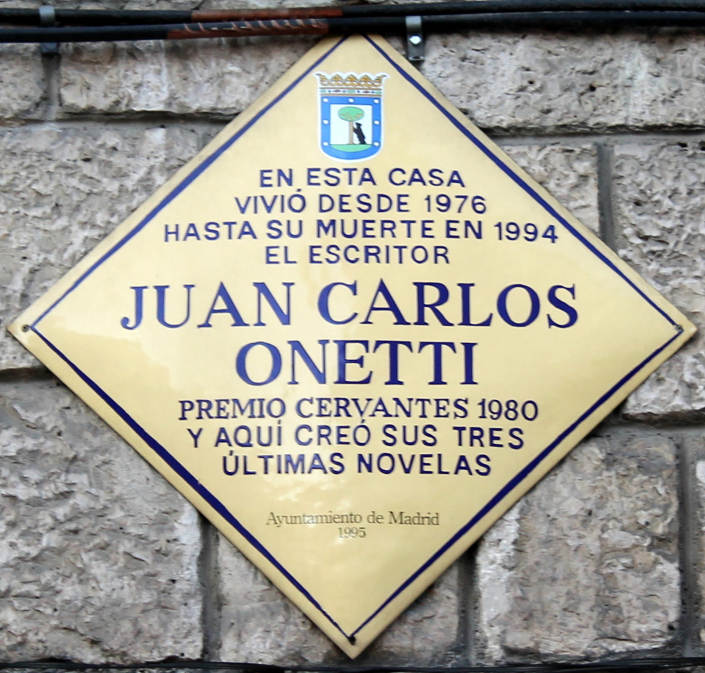 Aquí vivió Juan Carlos Onetti